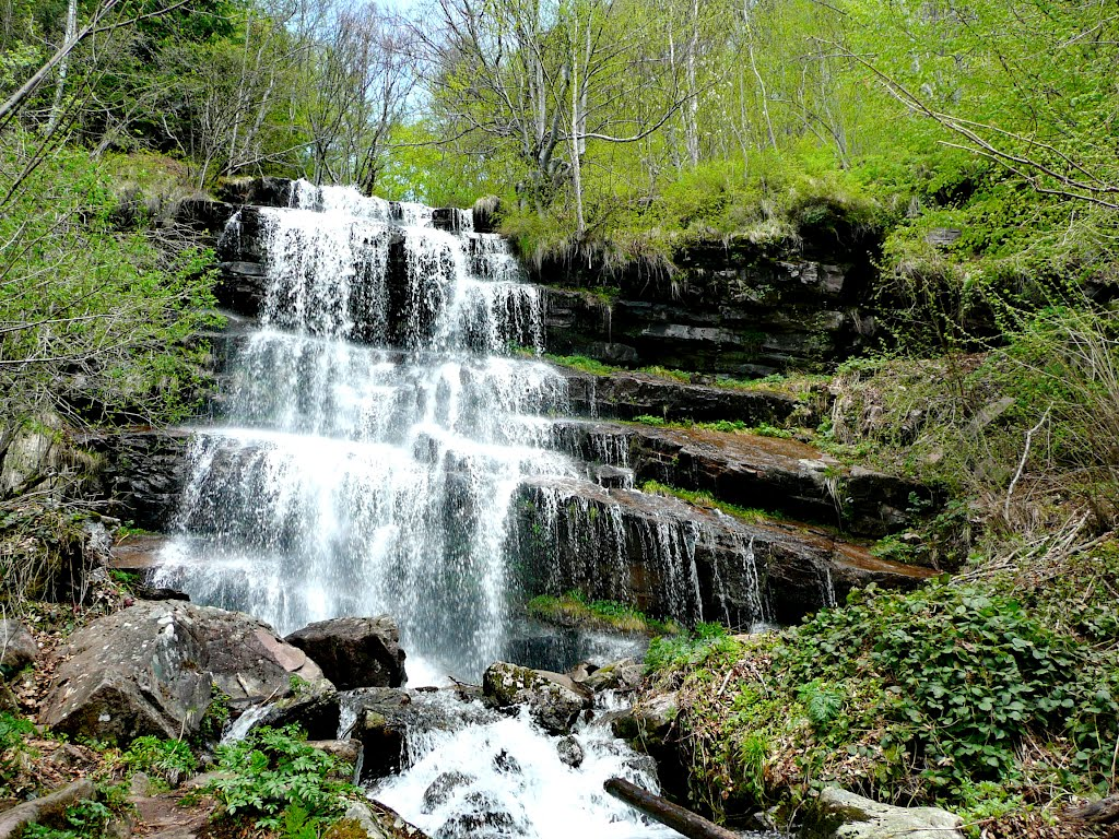 Српски (ћирилица): Водопад Тупавица